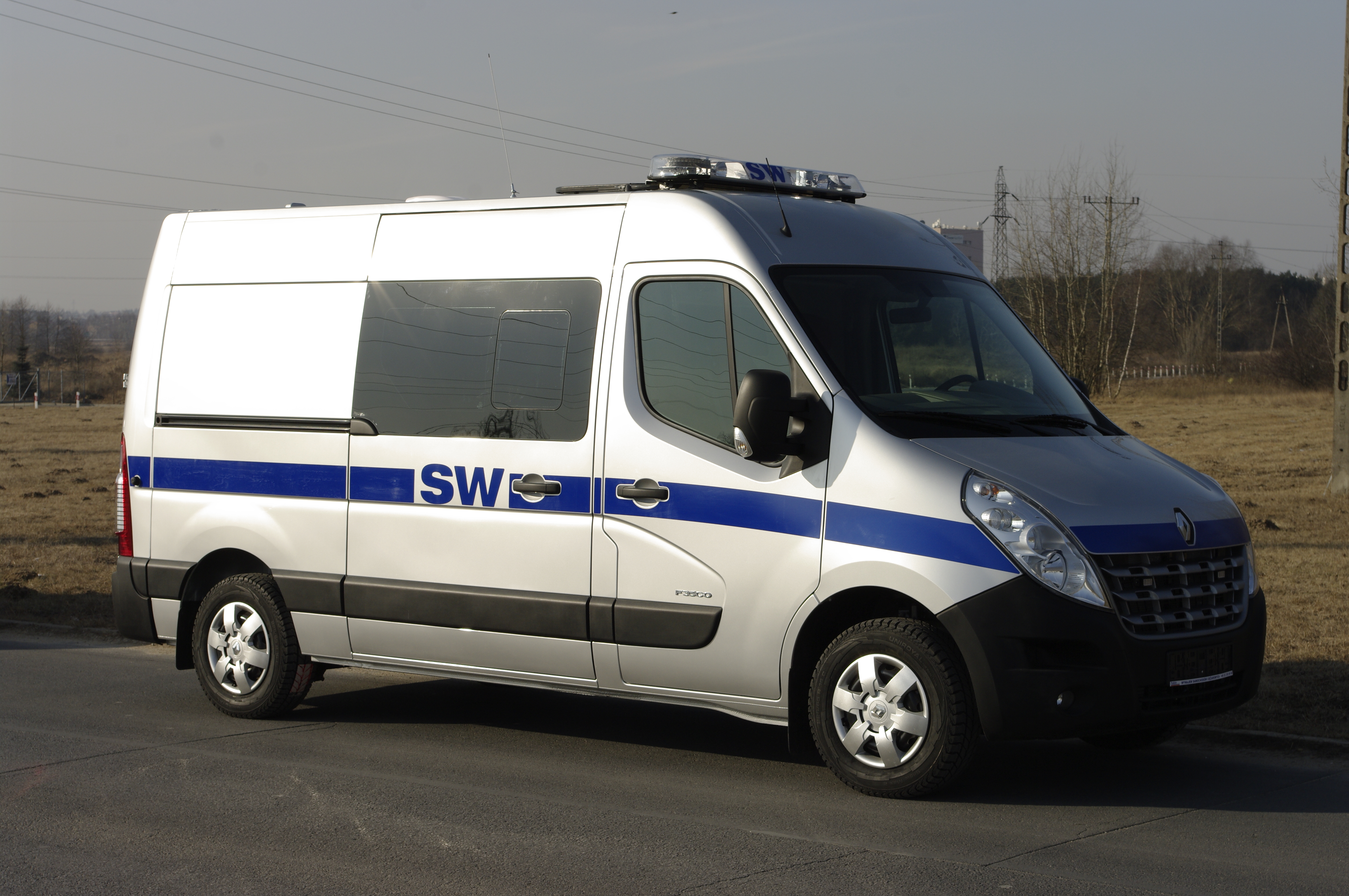 Pojazd Służby Więziennej na bazie Renault Mastera przygotowany przez AMZ Kutno